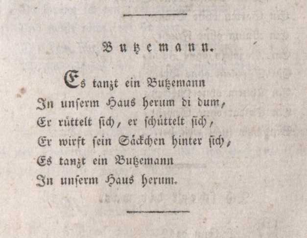 Purmèra edicion de Bi-Ba Butzemann